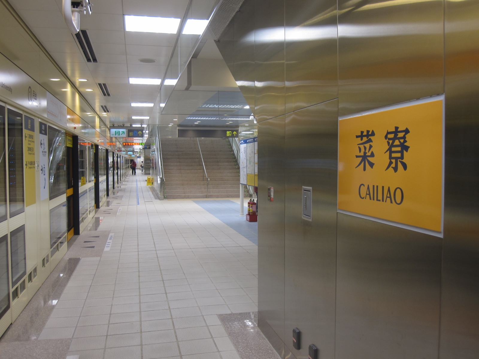 中文（台灣）: 台北捷運菜寮站第一月台。